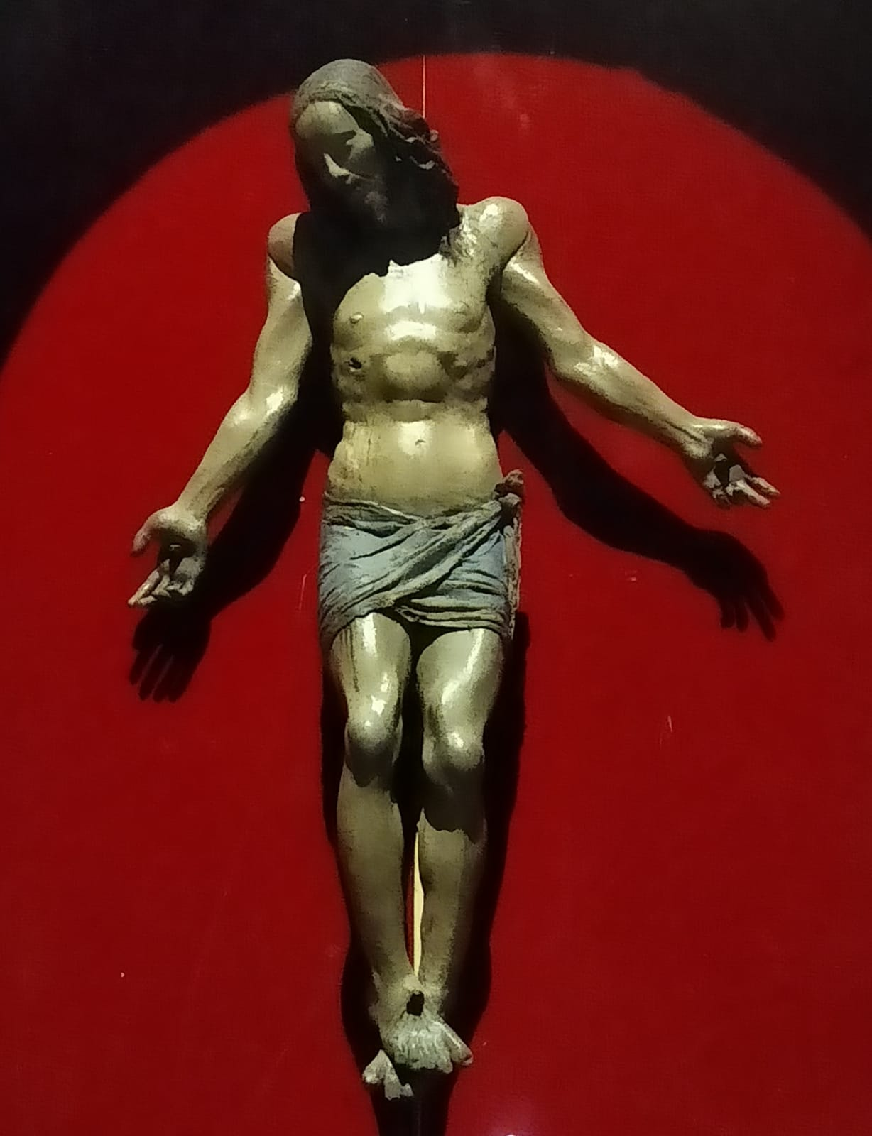 Scultura lignea raffigurante Cristo crocifisso risalente ai sec. XV - XVI, presente nella Chiesa di San Michele Arcangelo a Cetica.